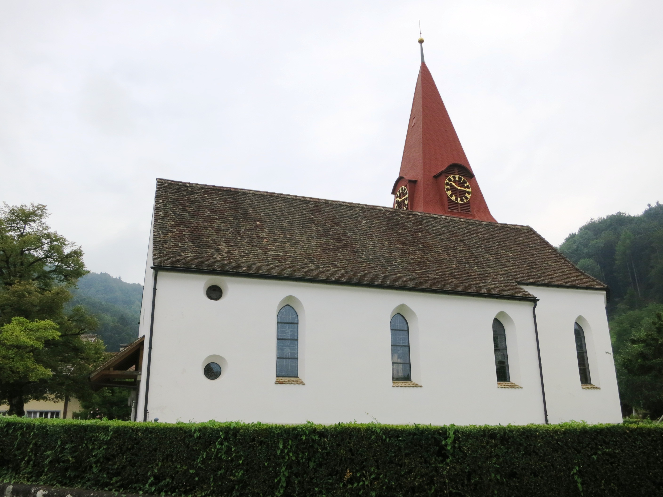 Kirche, Zell ZH, Schweiz